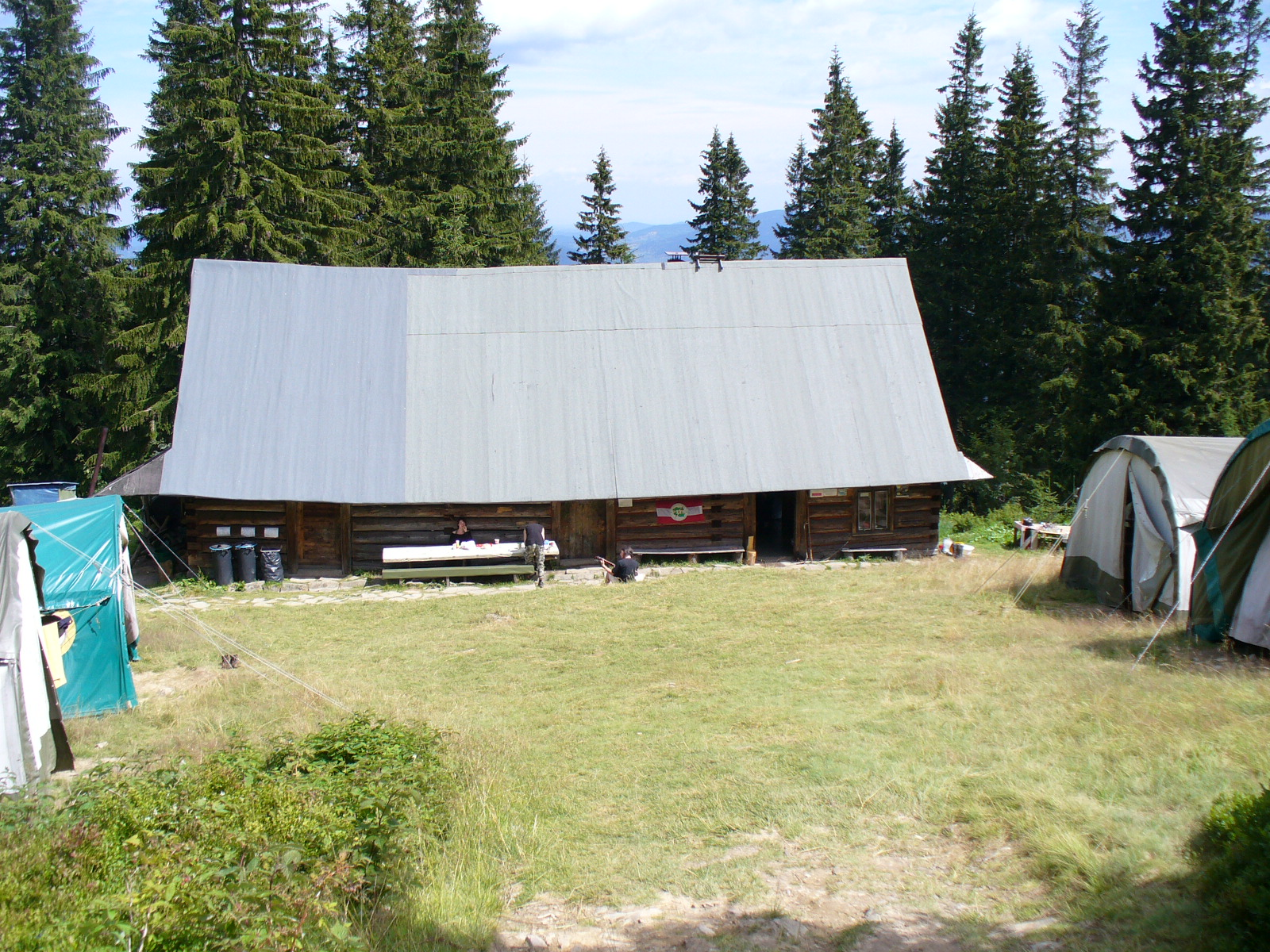 Baza namiotowa na Hali Górowej. Na zdjęciu bacówka